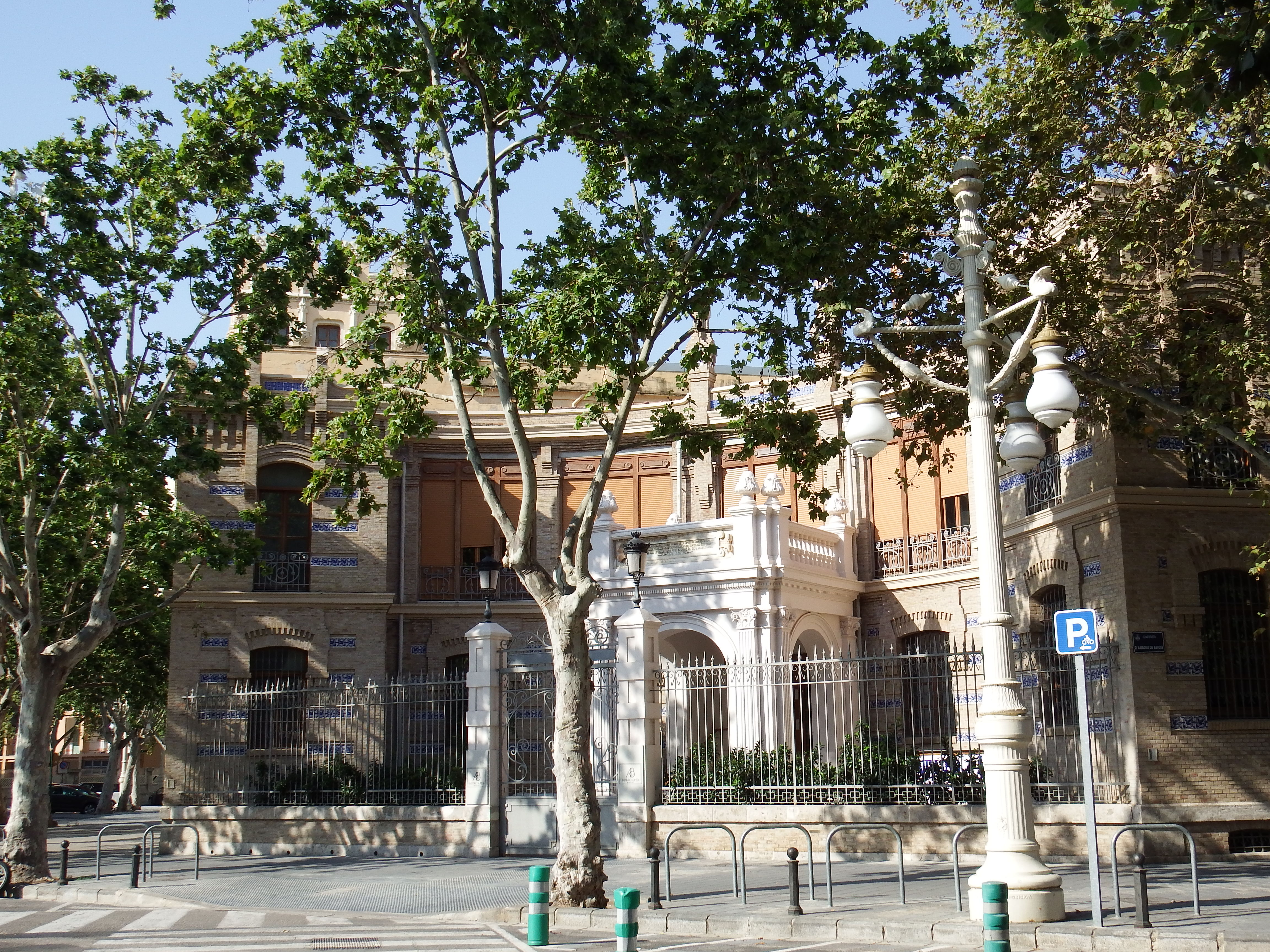 Asilo de Lactancia o Balneario de la Alameda, sito en la calle Amadeo de Saboya 14, Valencia. 15.250-099.